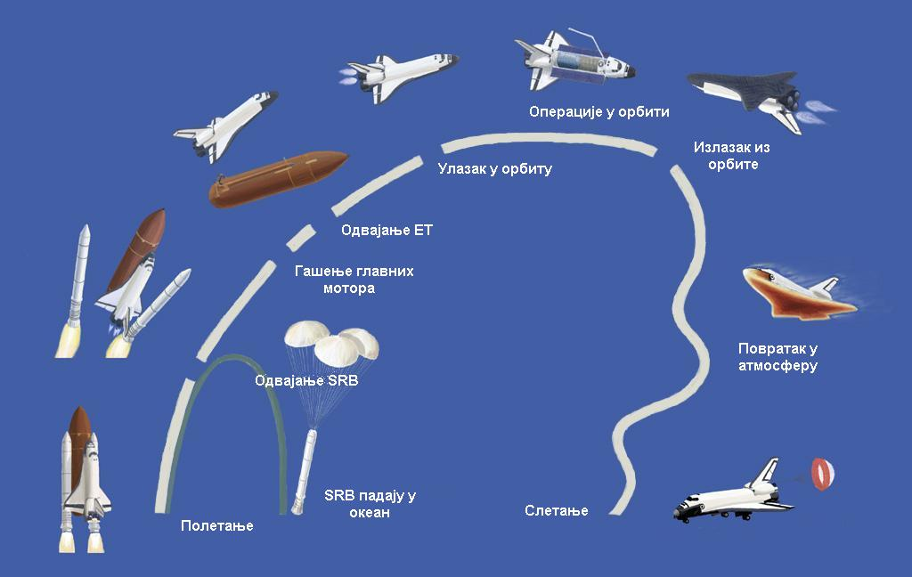 Опис мисије спејс-шатла.